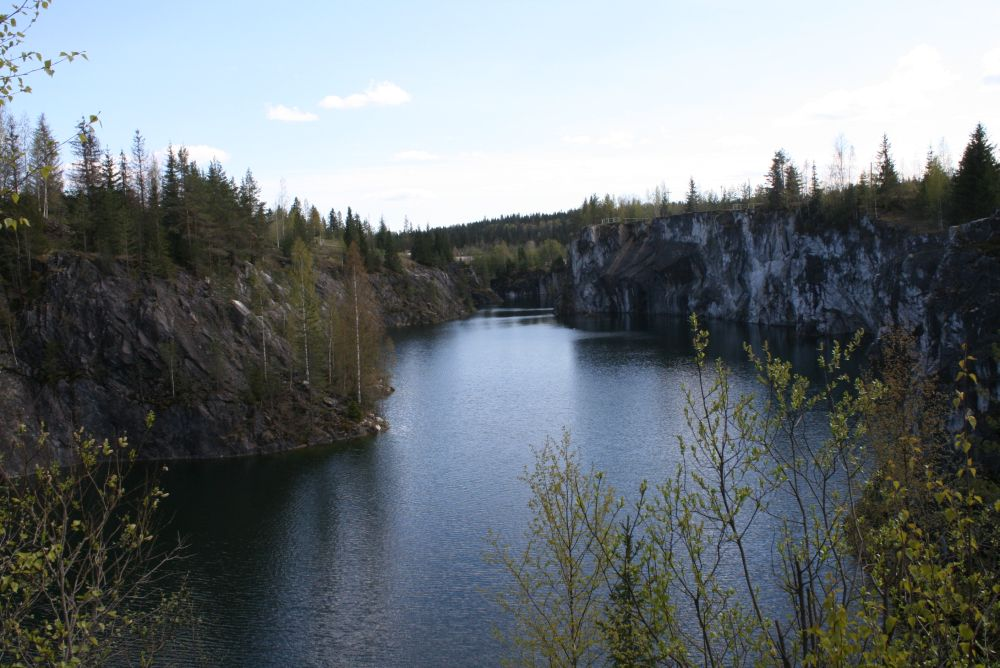 Marble mine in Ruskeala, Karelia